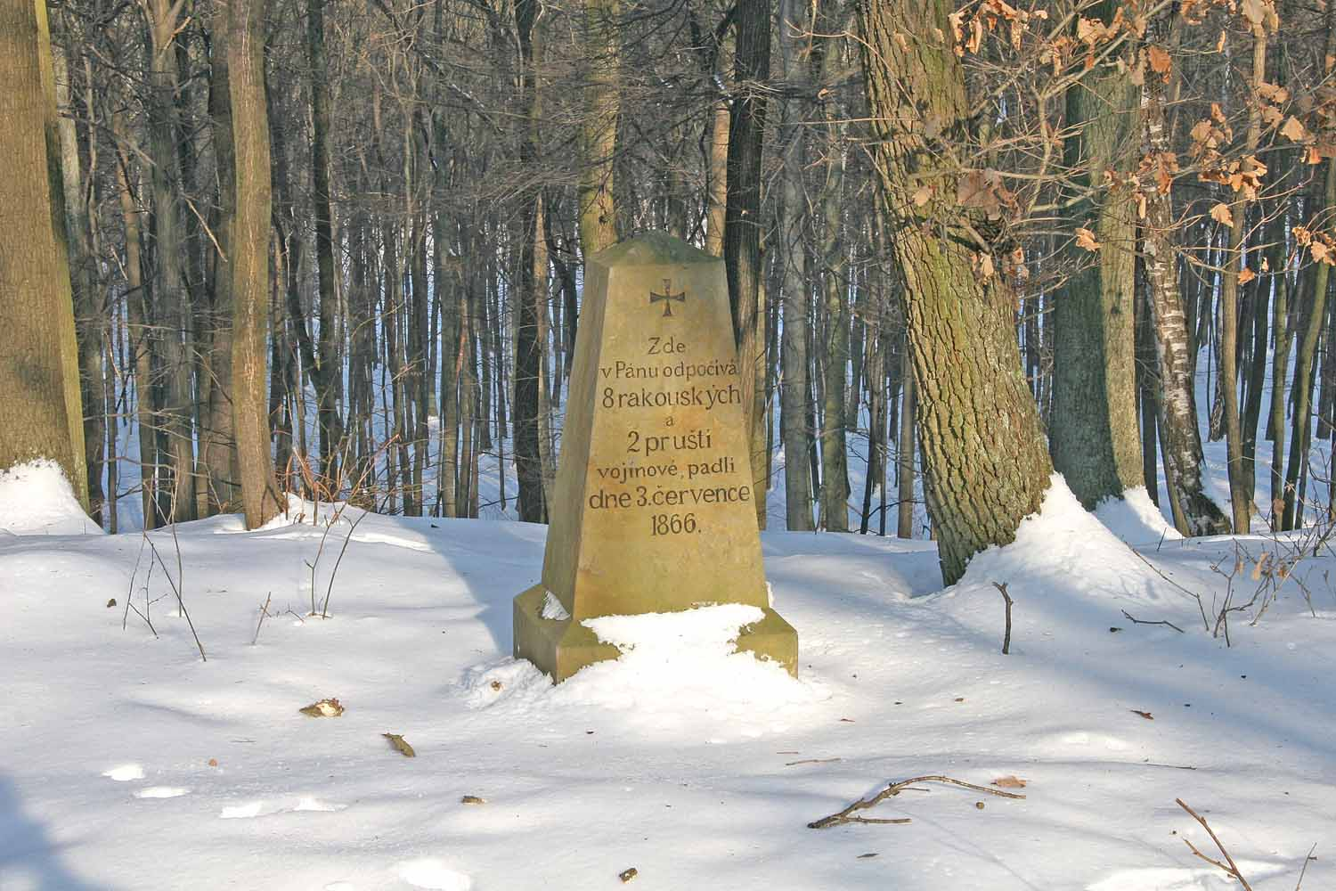 Pomník z války roku 1866